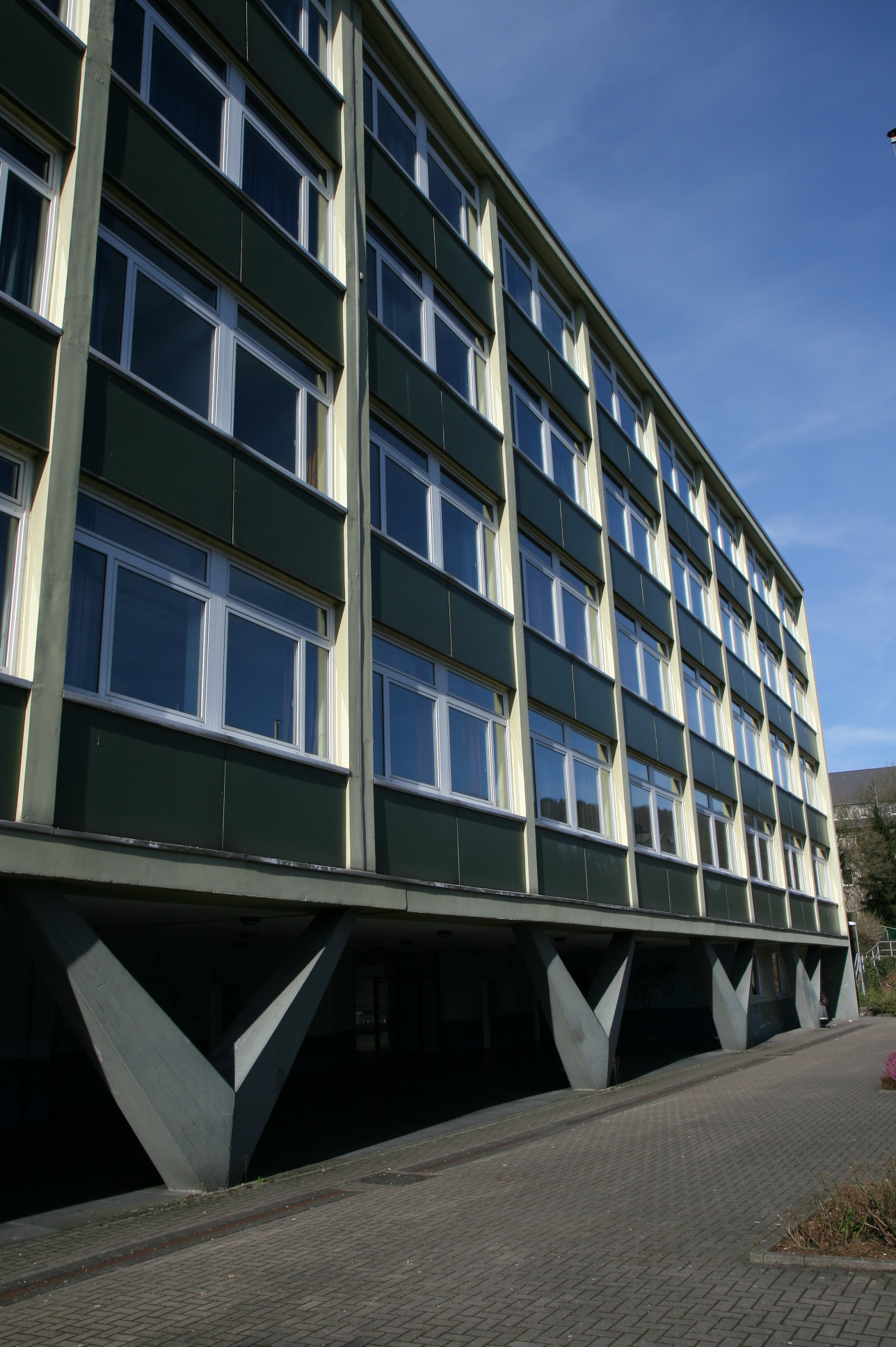 Eugen-Schmalenbach-Schule in Altena (Berufskolleg). Kaufmännische Schulen des Märkischen Kreises.